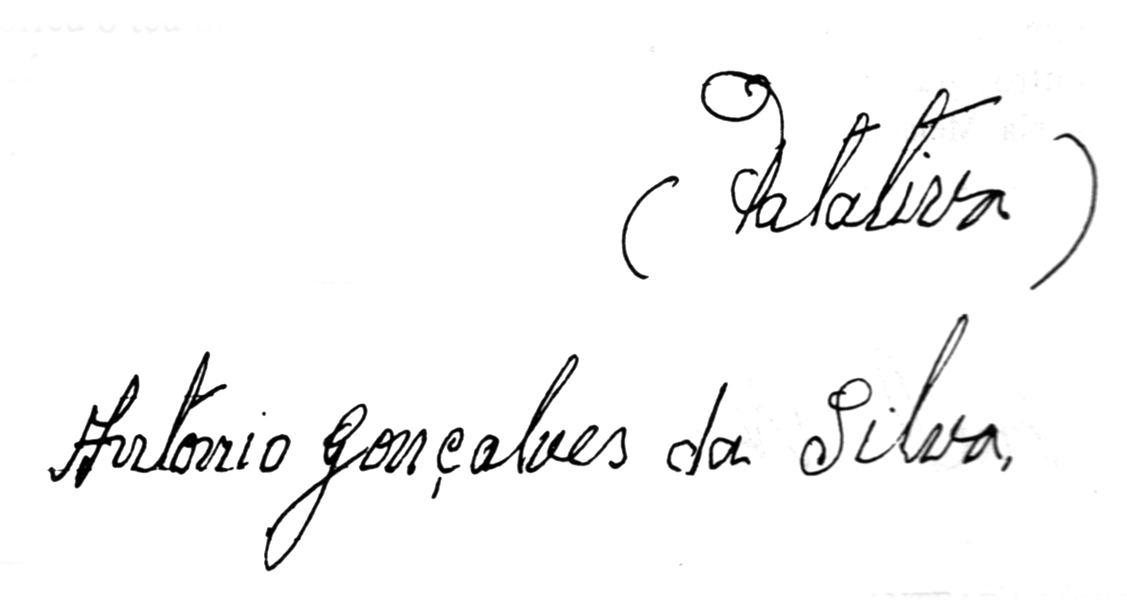 Assinatura do poeta brasileiro de literatura de cordel, Patativa do Assaré.